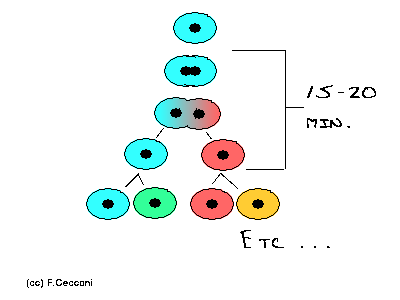 schema de la reproduction des bactéries par scissiparité